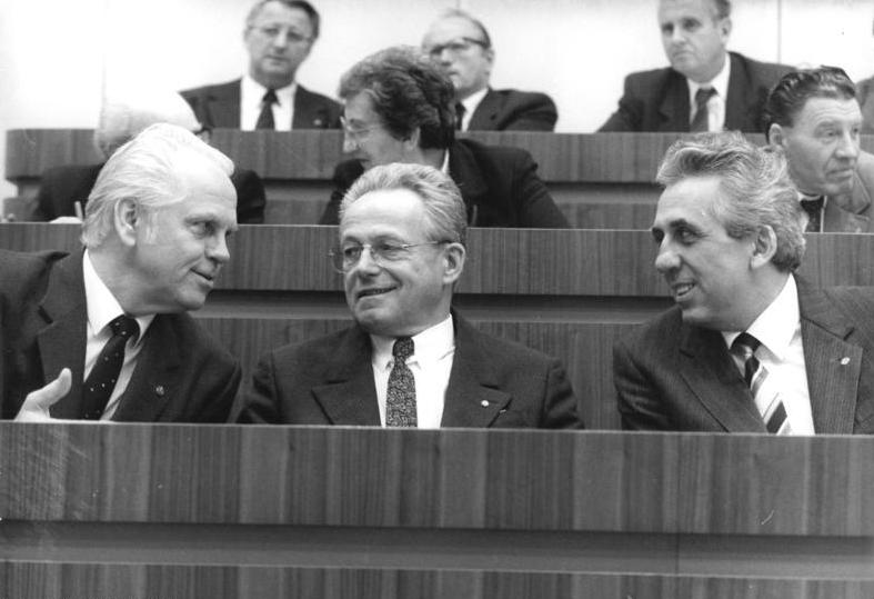 ADN-ZB Mittelstädt 13.11.1989 Berlin: Volkskammer-Tagung Die 11. Tagung der Volkskammer der DDR begann im Plenarsaal des Palastes der Republik. Gespannt verfolgen die Kandidaten für das Amt des Parlamentspräsidenten Dr. Günther Maleuda (1., DBD) und Prof. Dr. Manfred Gerlach (m.,LDPD) die Auszählung der Stichwahl. R.: Egon Krenz, Generalsekretär des ZK der SED und Vorsitzender des Staatsrates der DDR.